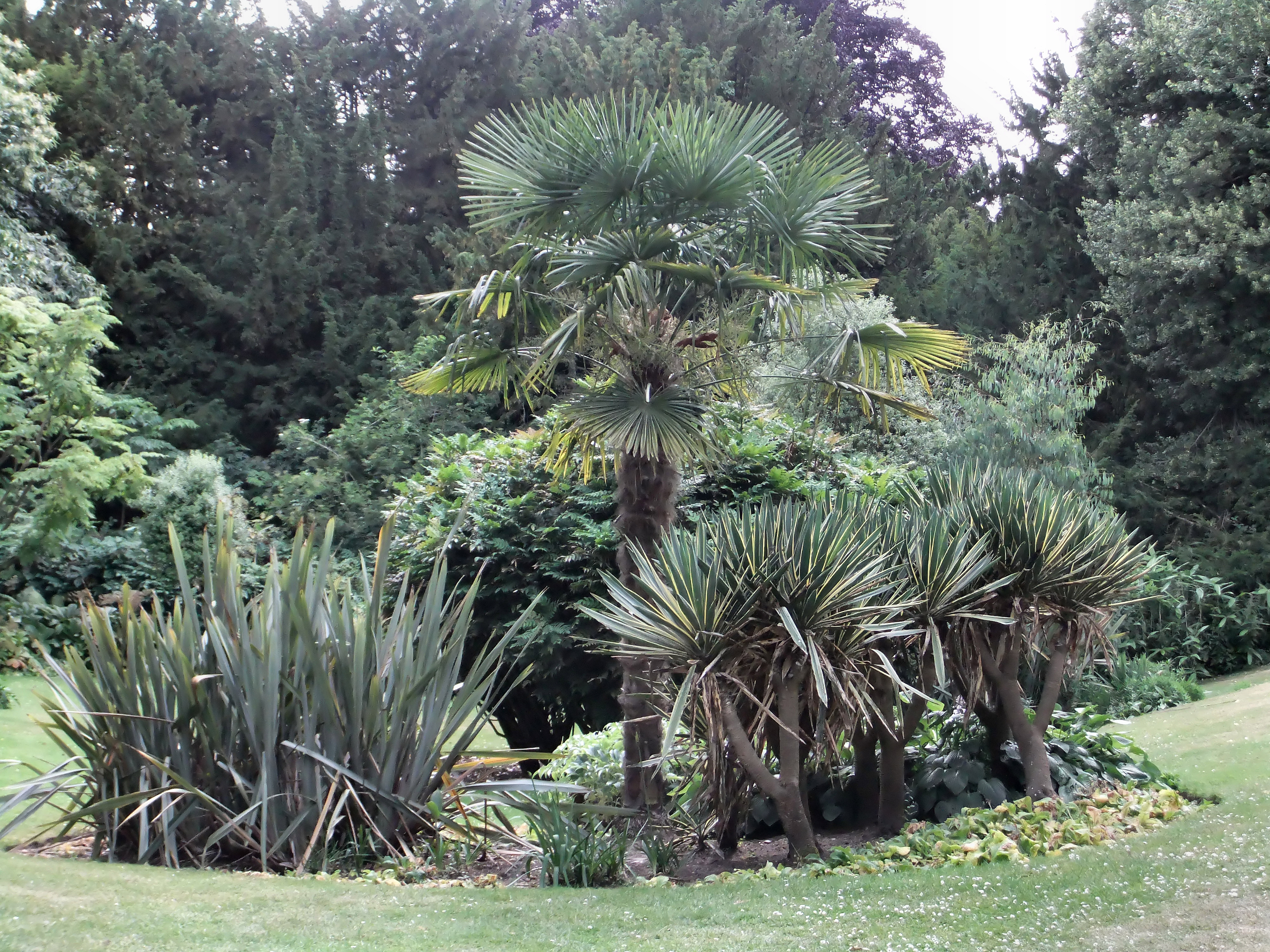 Palmen im Subtropischen Garten von Newstead Abbey